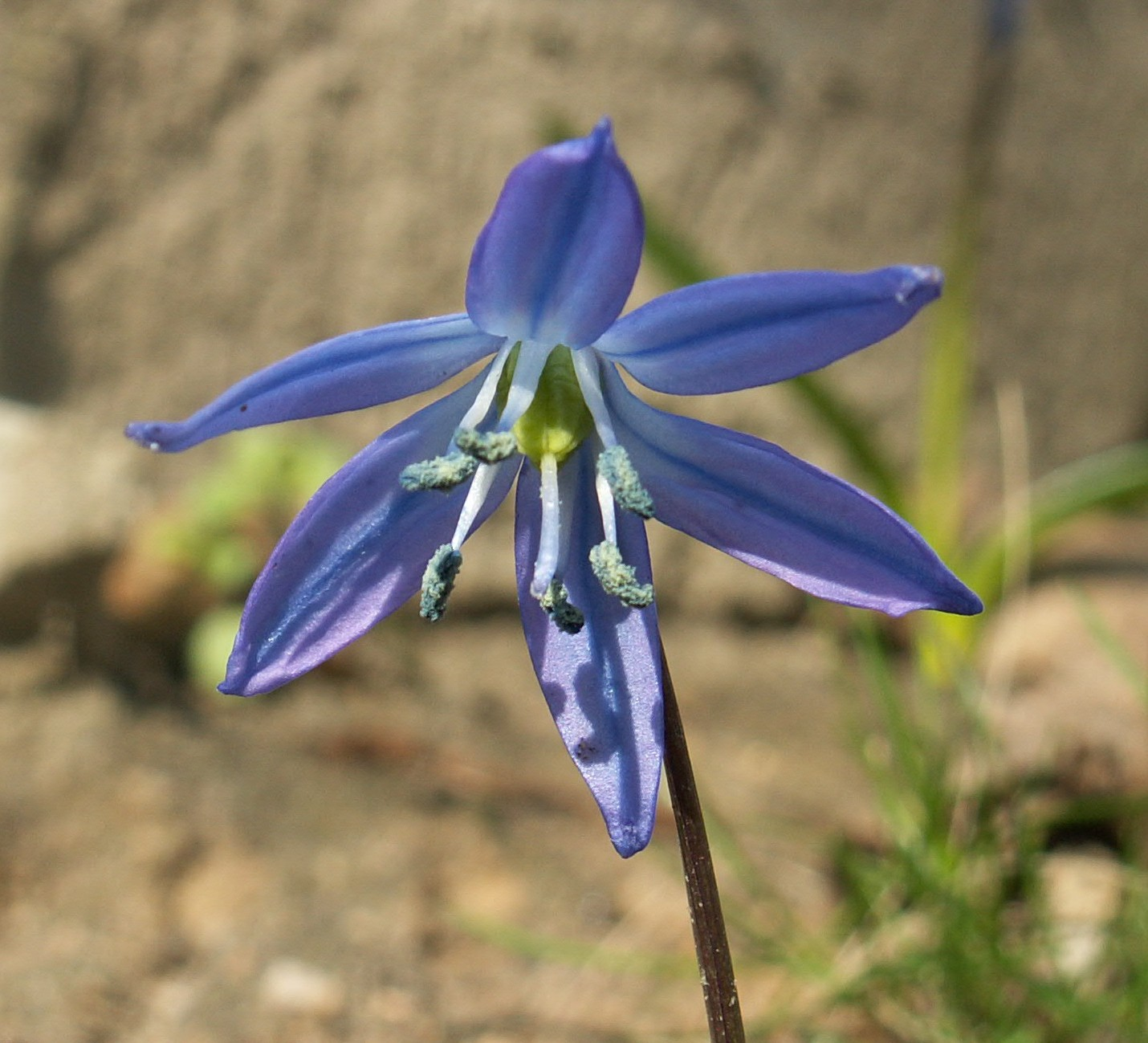 Scilla siberica, flower